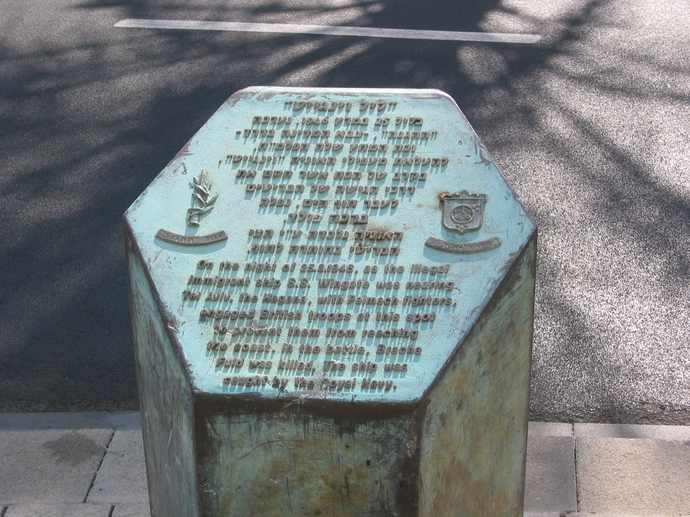 L